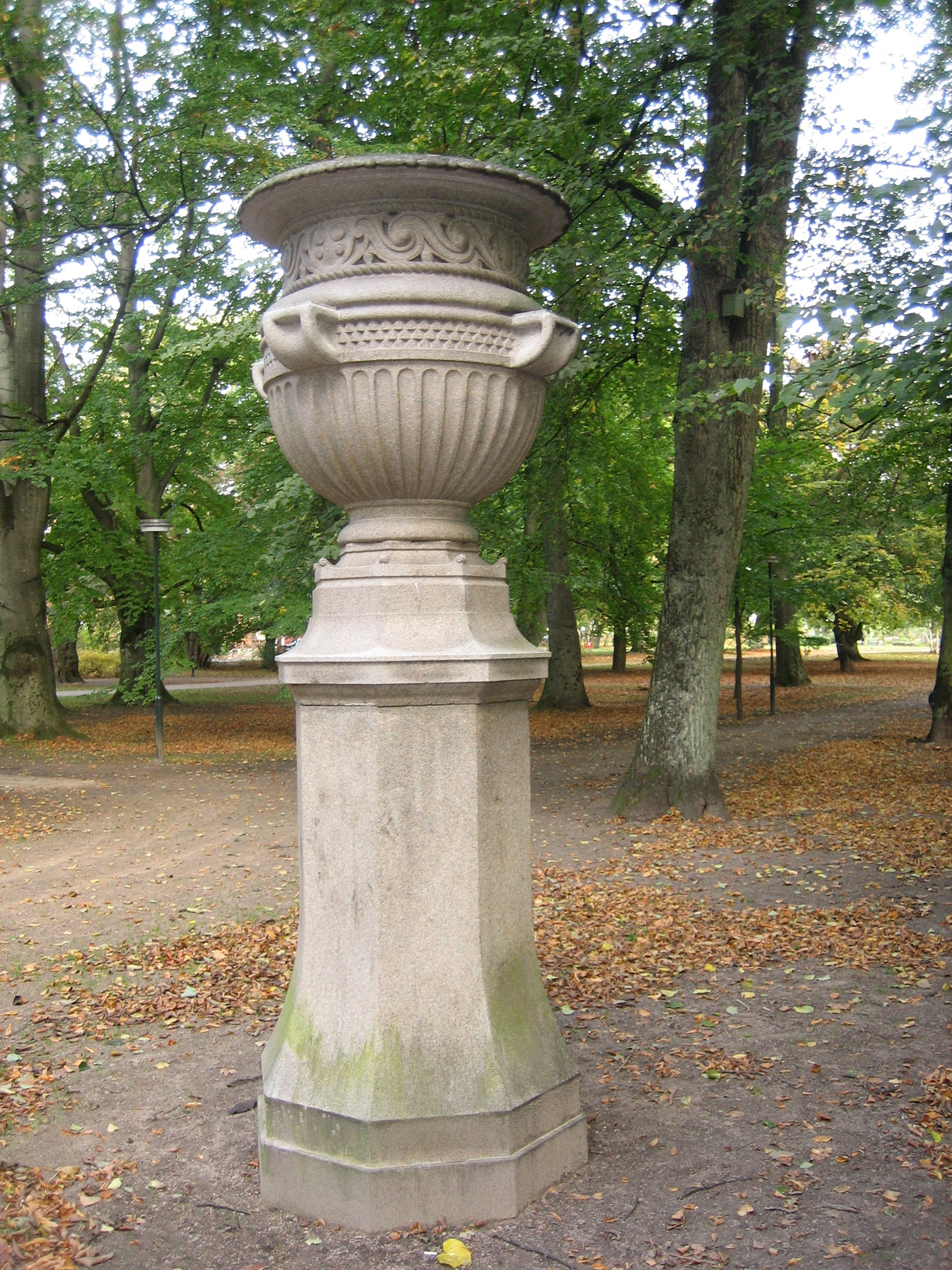 Söndrumsurnan av Ferdinand Boberg i Norrekatts park i Halmstad.